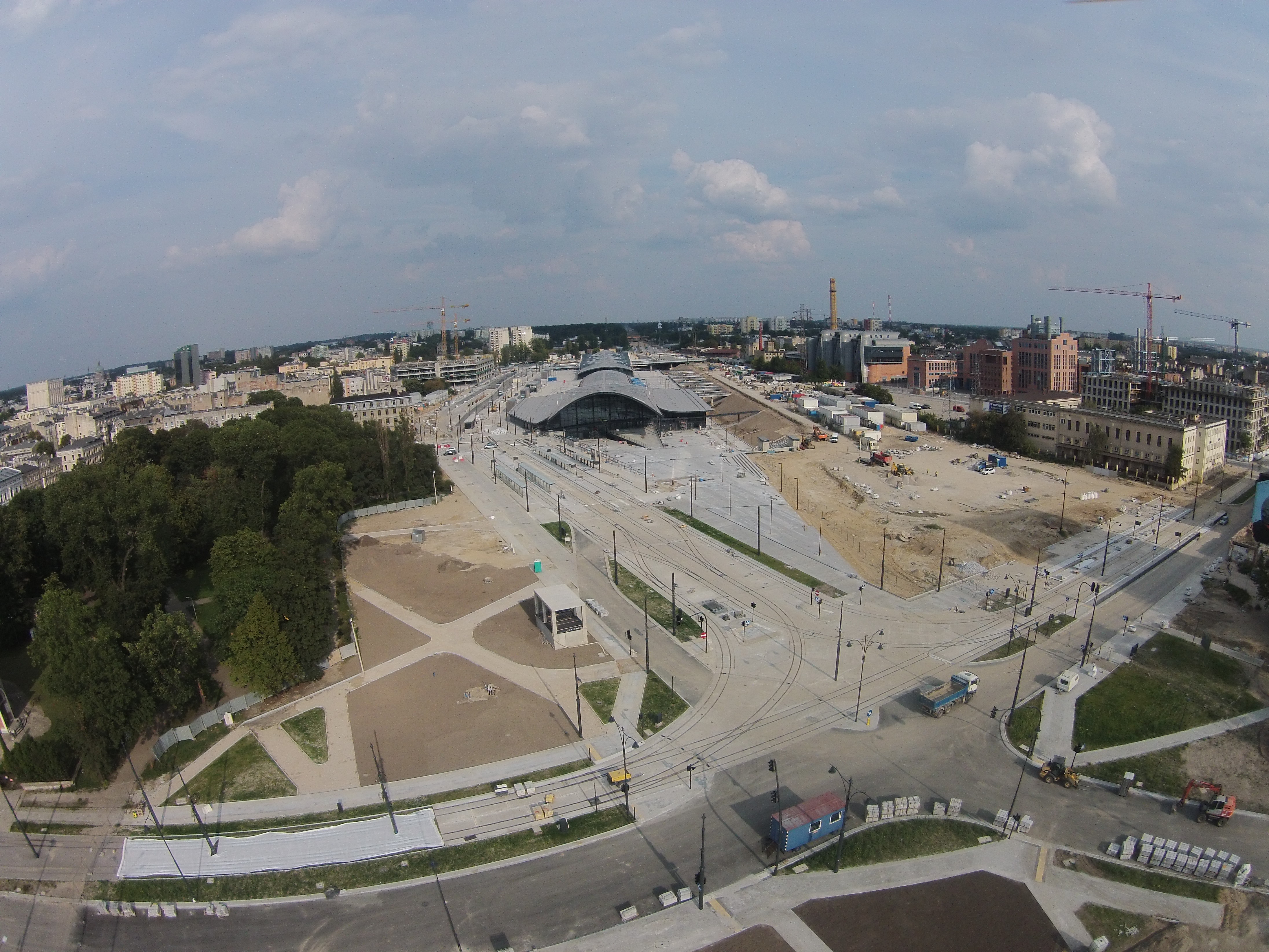 Nowe Centrum Łodzi - Dworzec Łódź Fabryczna